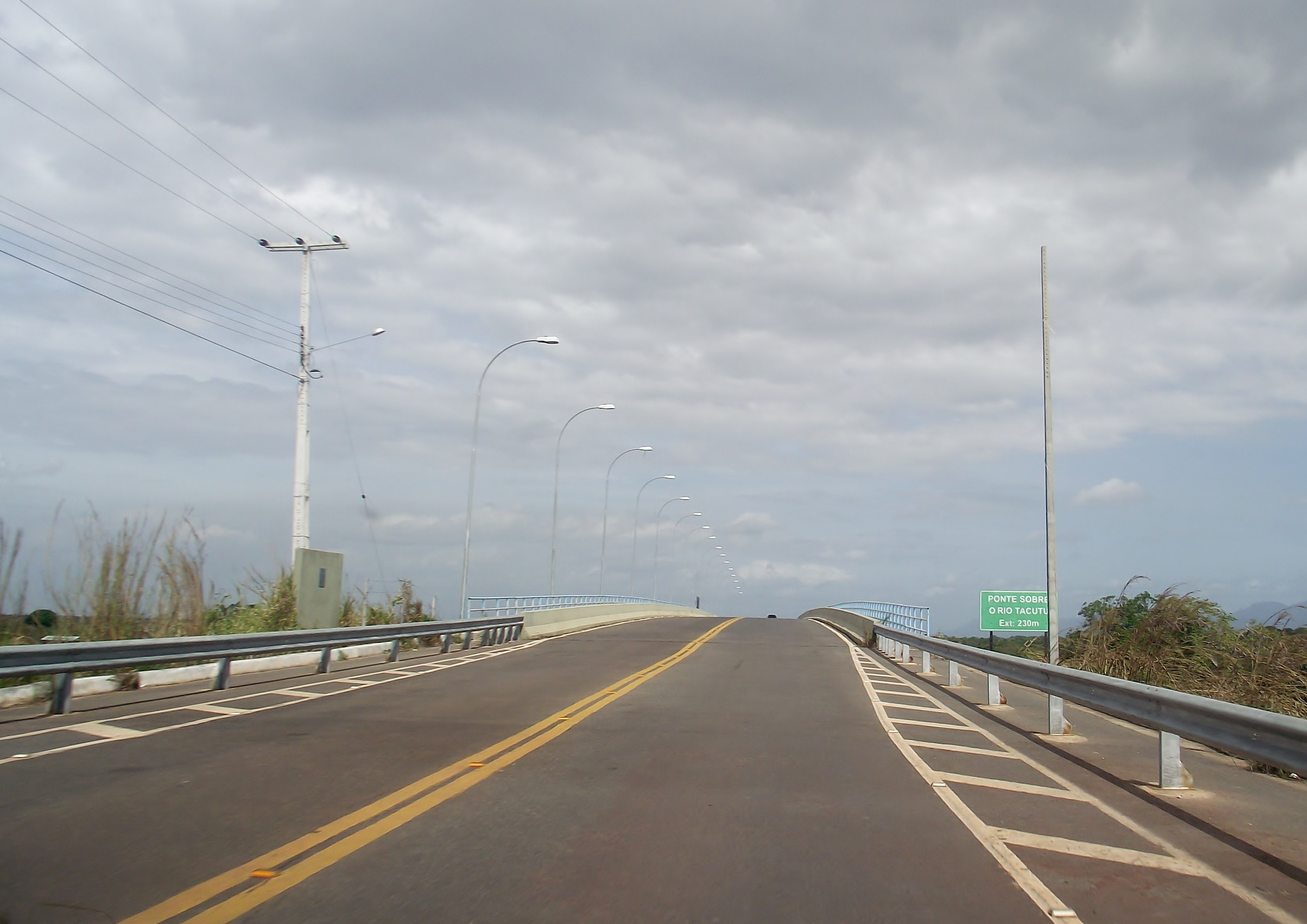 Takutu Bridge Brazil-Guyana